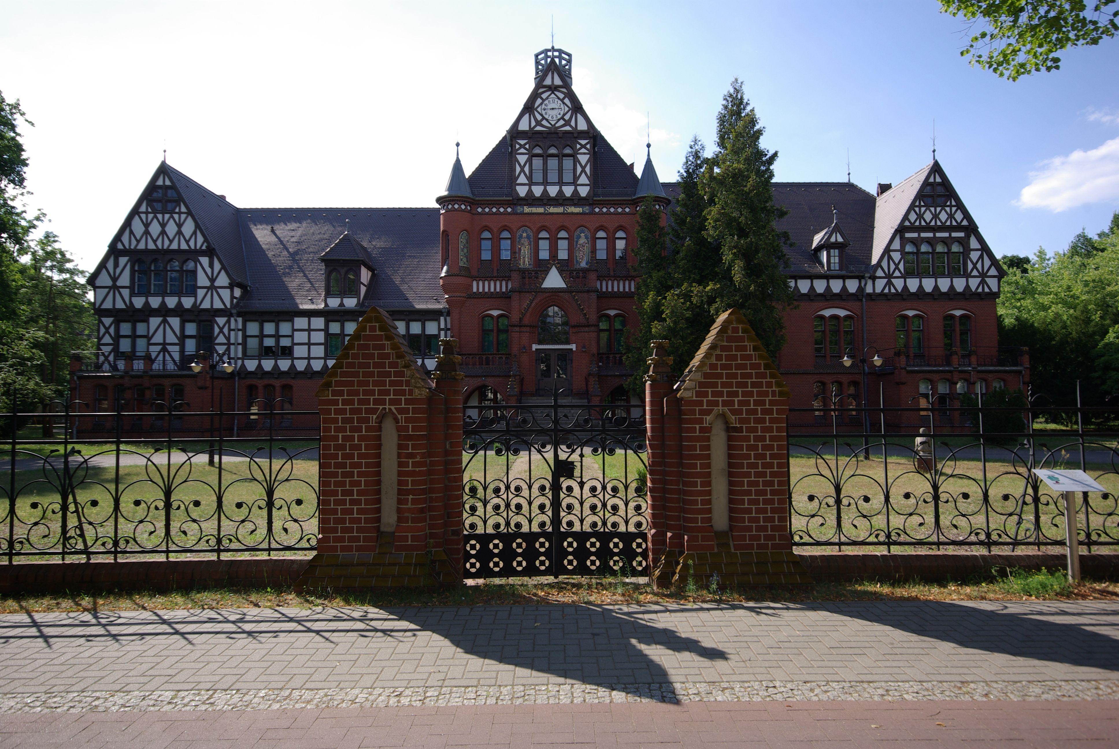 Königs Wusterhausen in Brandenburg. Die "Blindenschule" befindet sich in der Luckenwalder Straße 64. Entstanden iit das Gebäude von 1899 bis 1901 als Heim für arme Blinde. Das Gebäude steht unter Denkmalschutz.